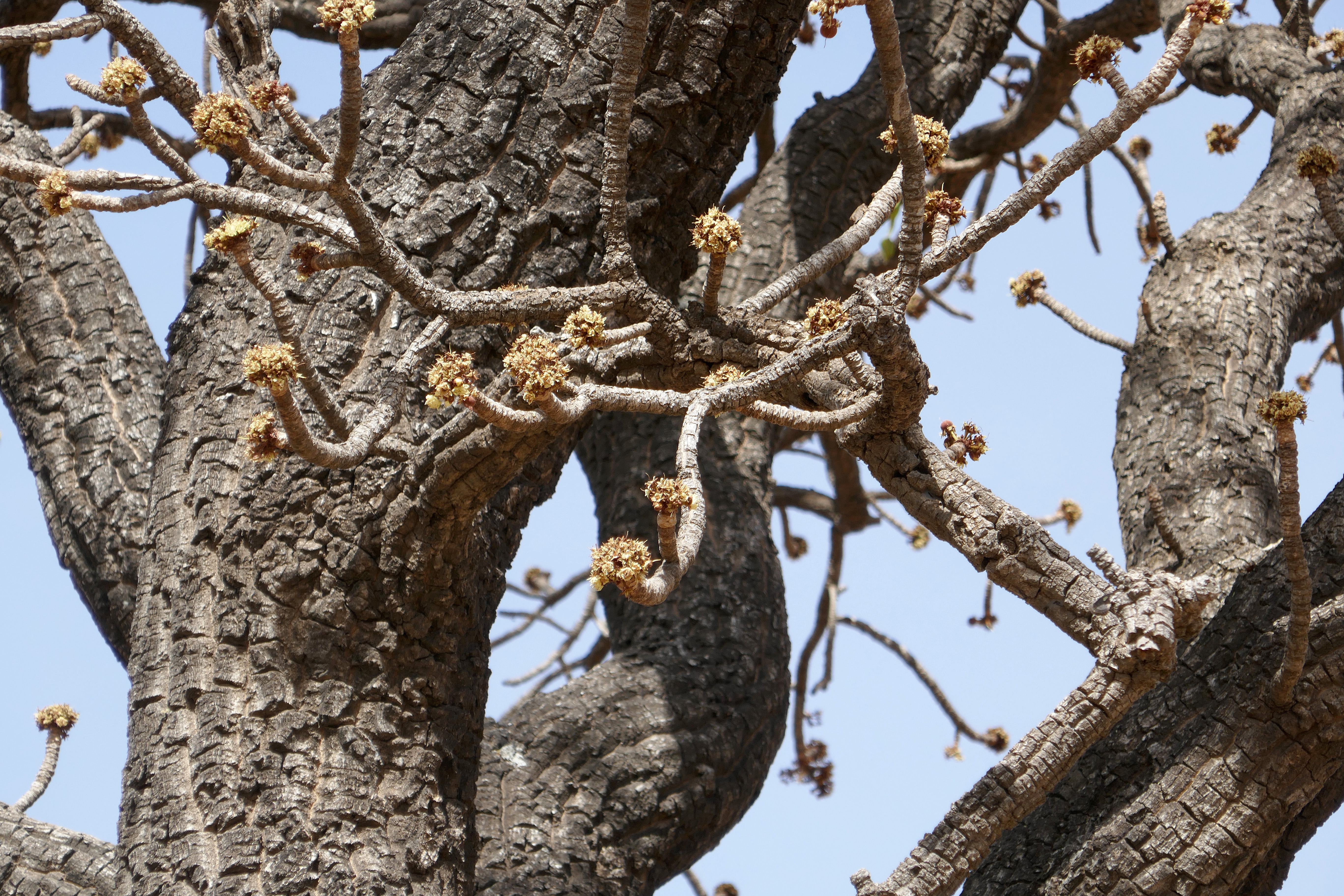 Parc national de la Pendjari (Bénin) : arbre à karité (Vitellaria paradoxa).